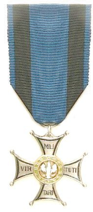 Srebrny krzyż Virtuti militari